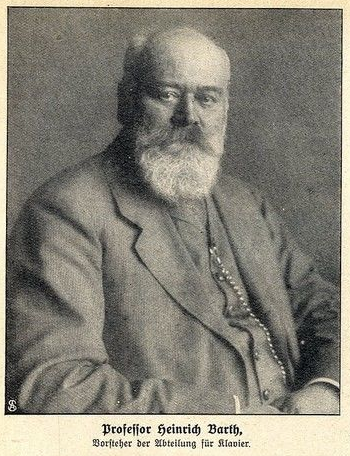 Professor Heinrich Barth, Vorsteher der Abteilung für Klavier an der Königlichen Akademischen Hochschule für Musik